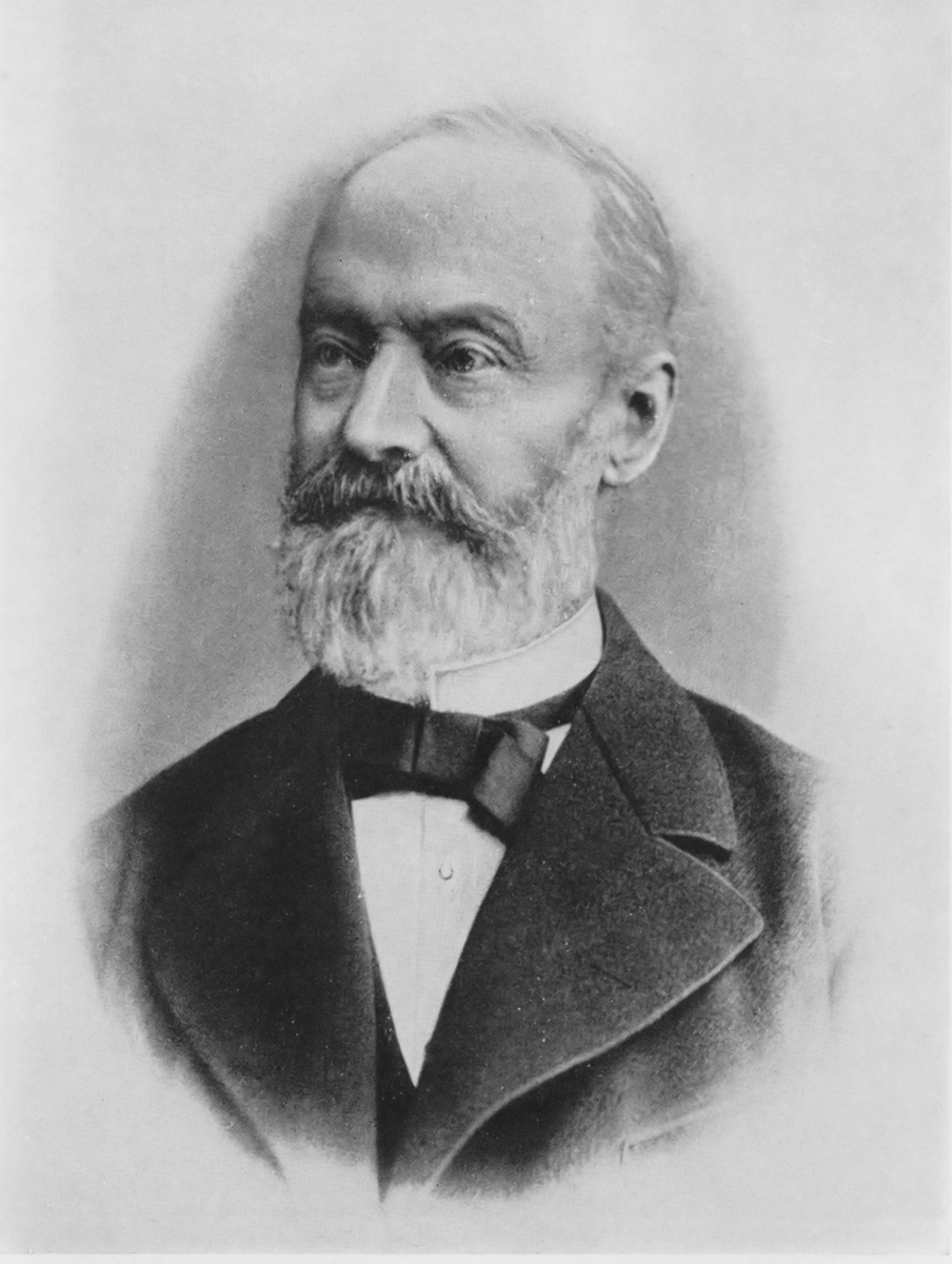 Julius Pintsch (1815-1884), deutscher Industrieller und Gründer der späteren Julius Pintsch AG Berlin-Fürstenwalde, Vorgängerfirma der späteren Pintsch Bamag AG Butzbach